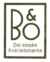 Bang & Olufsons logo på 1940-talet